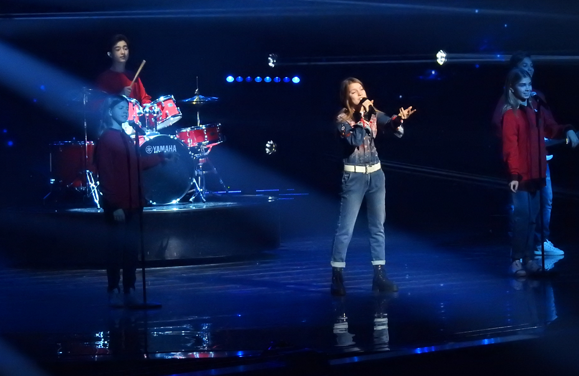 Rosyjska piosenkarka Anna Filipczuk podczas prób do występu w 16. Konkursie Piosenki Eurowizji dla Dzieci w Mińsku, 24 listopada 2018.